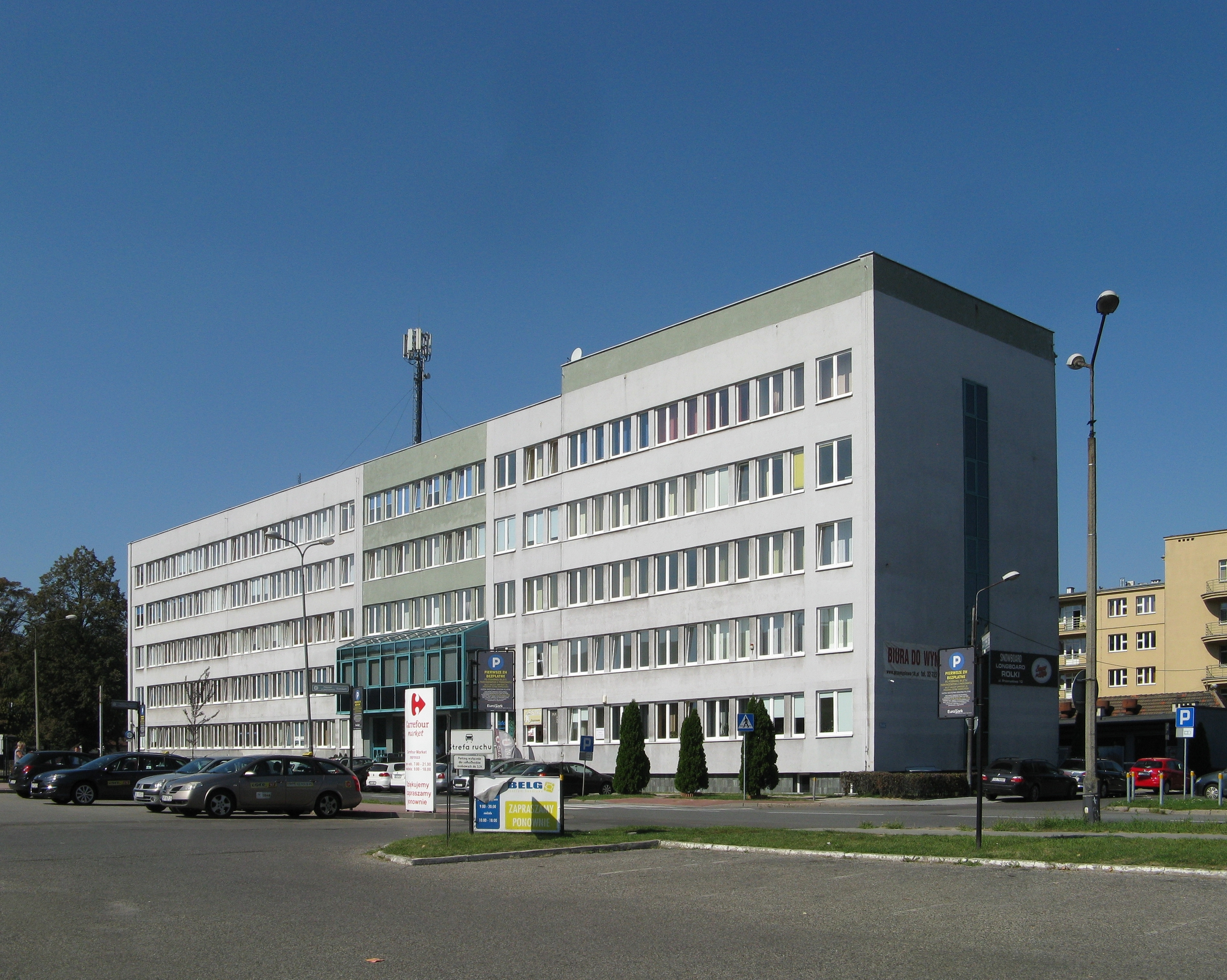 Budynek przy ulicy Przemysłowej 10 w Katowicach, siedziba m.in. firmy Ideon, dawniej miało tu swoją siedzibę Przedsiębiorstwo Materiałów Podsadzkowych Przemysłu Węglowego, projekt budynku: Jurand Jarecki.